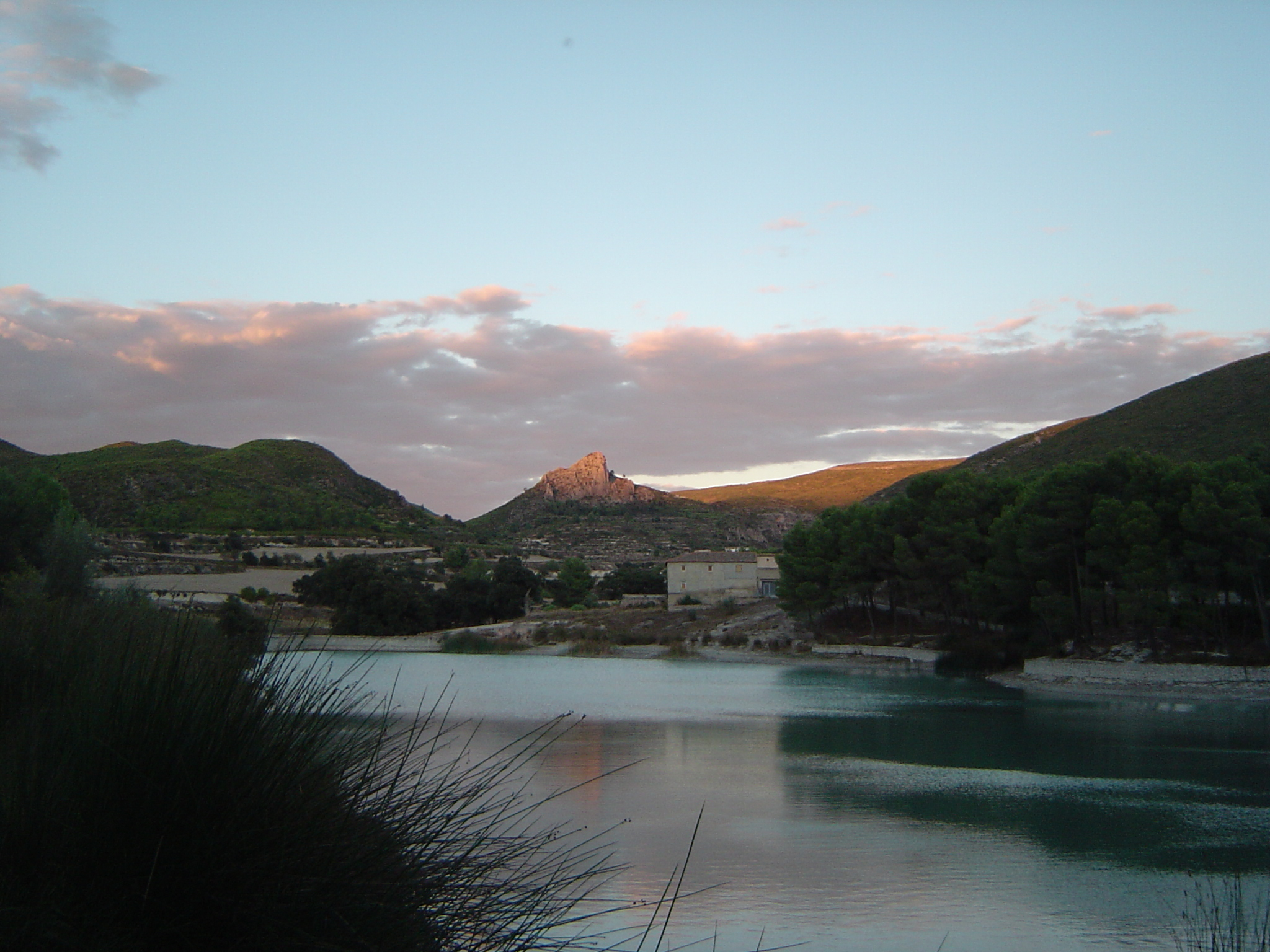 Embalse del Bosquet en Moixent, Valencia, con la peña del Picayo al fondo.